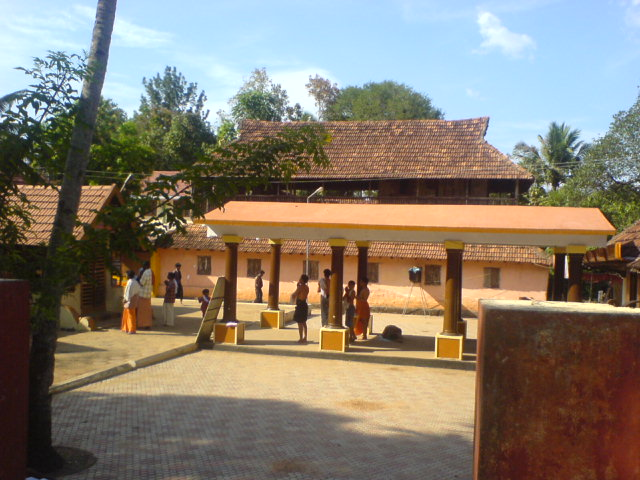 Pandalam kshethram